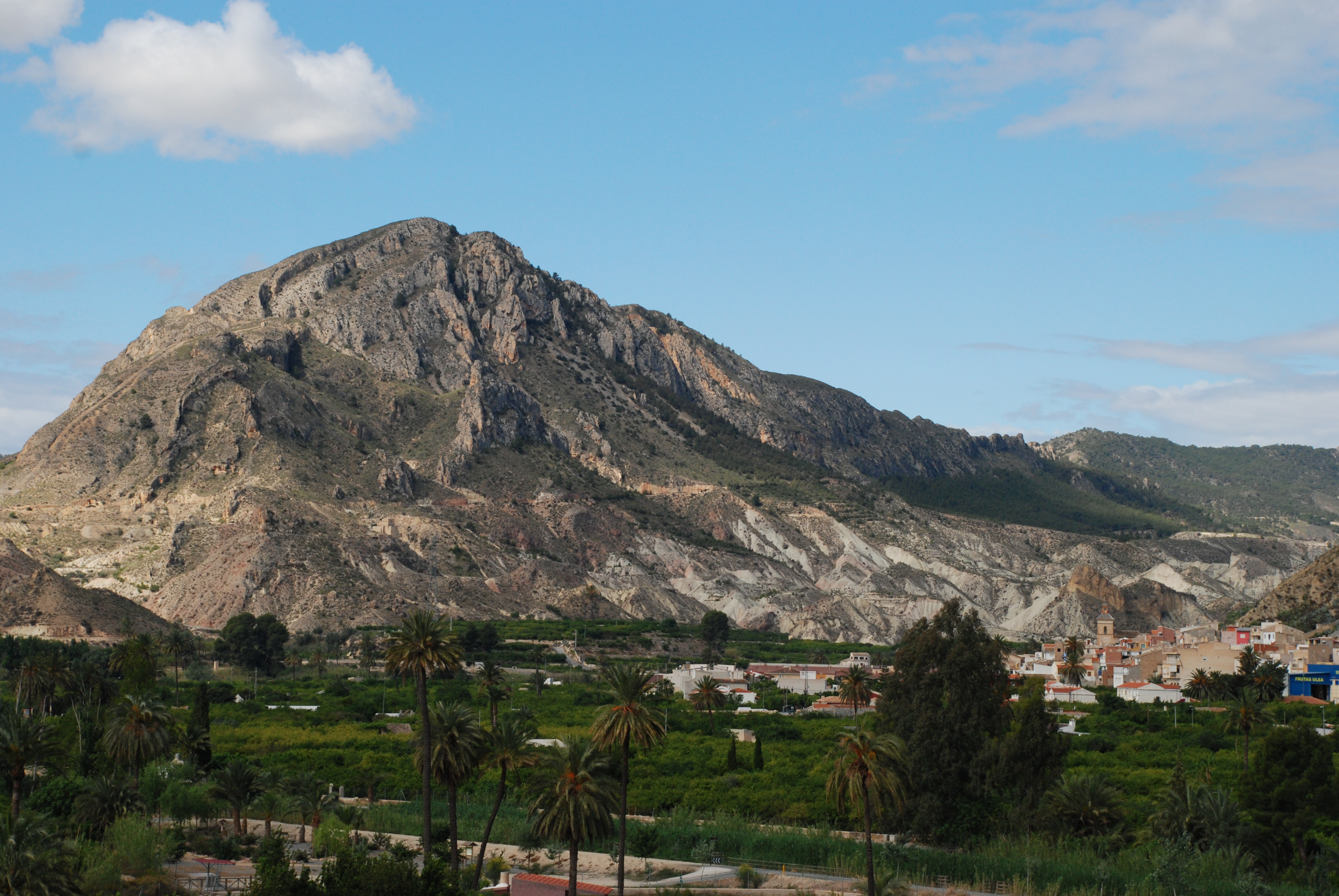 Sierra de Ricote-La Navela This is a photography of a Site of Community Importance in Spain with the ID: ES6200026. Natura2000 entry, EEA entry